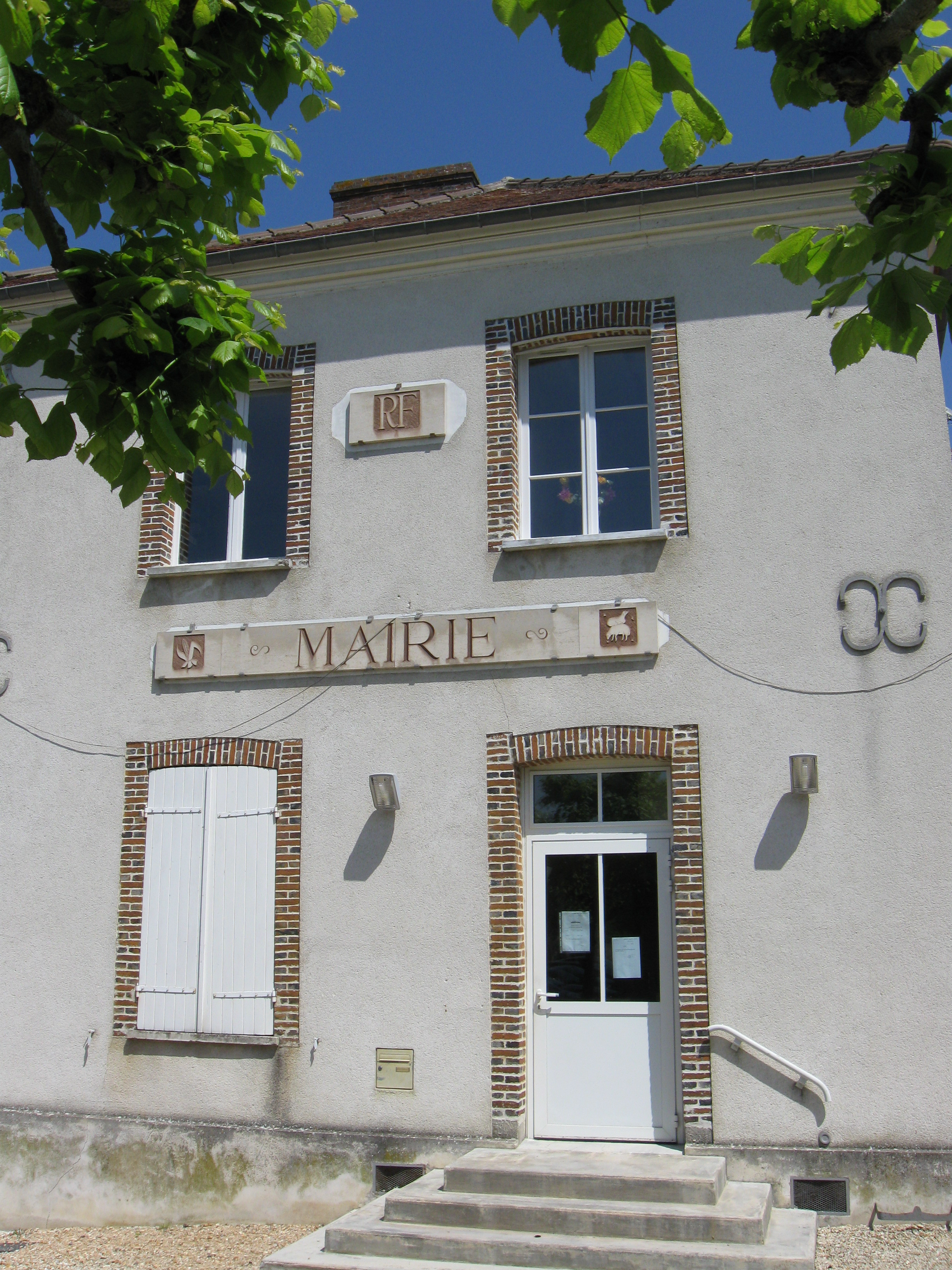 Mairie de Villenauxe-la-Petite. (département de la Seine-et-Marne, région Île-de-France).